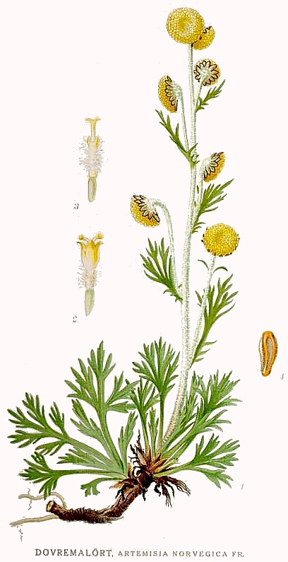 Original Description Dovremalört, Artemisia norvegica Fr.